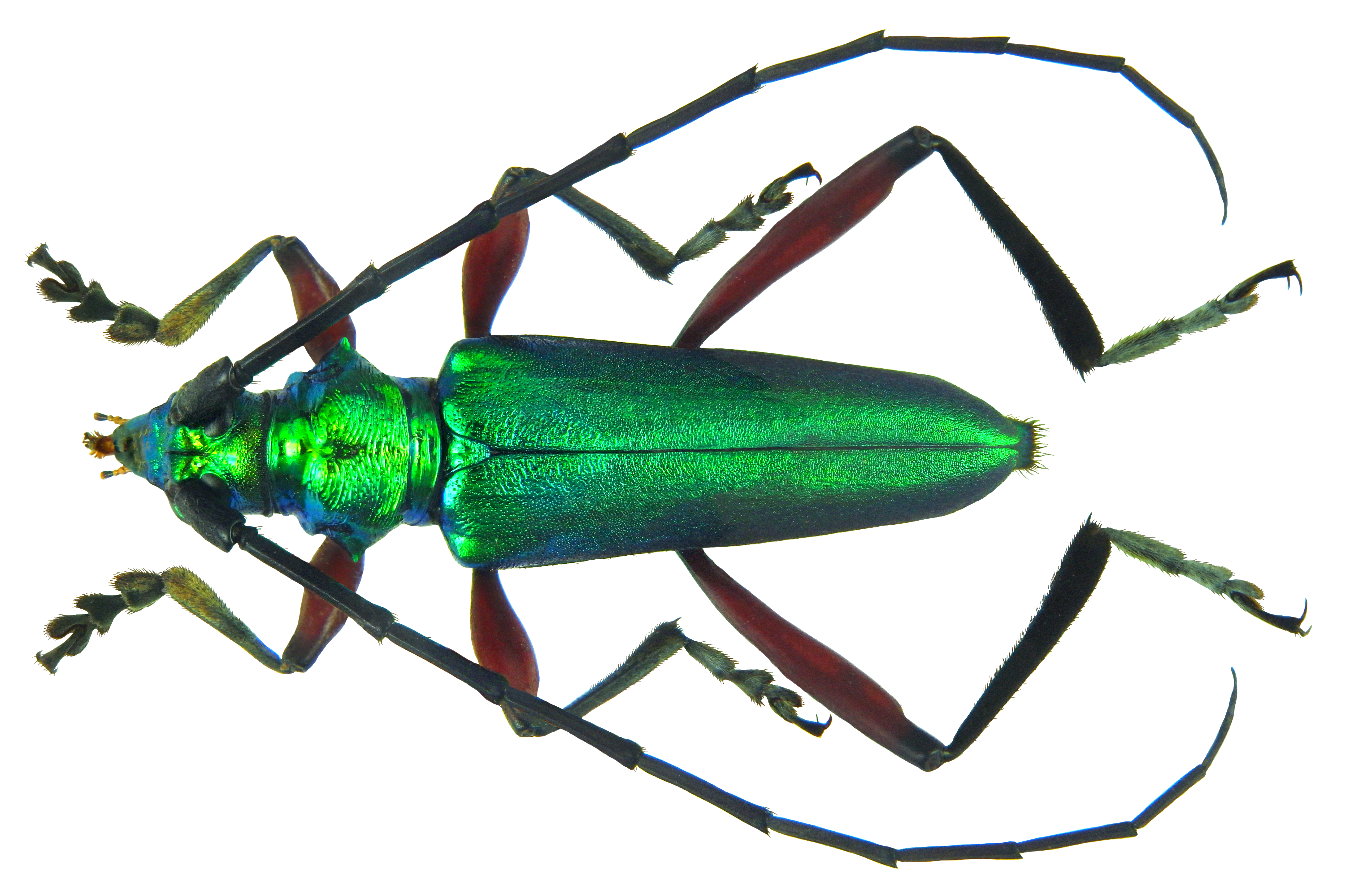 Family: Cerambycidae Size: 24 mm Location: Kenya, Mombasa, Diani-Beach leg. U.Schmidt, 9.-19.IV.1990; det. F. Vitali, 2015 Photo: U.Schmidt, 2012